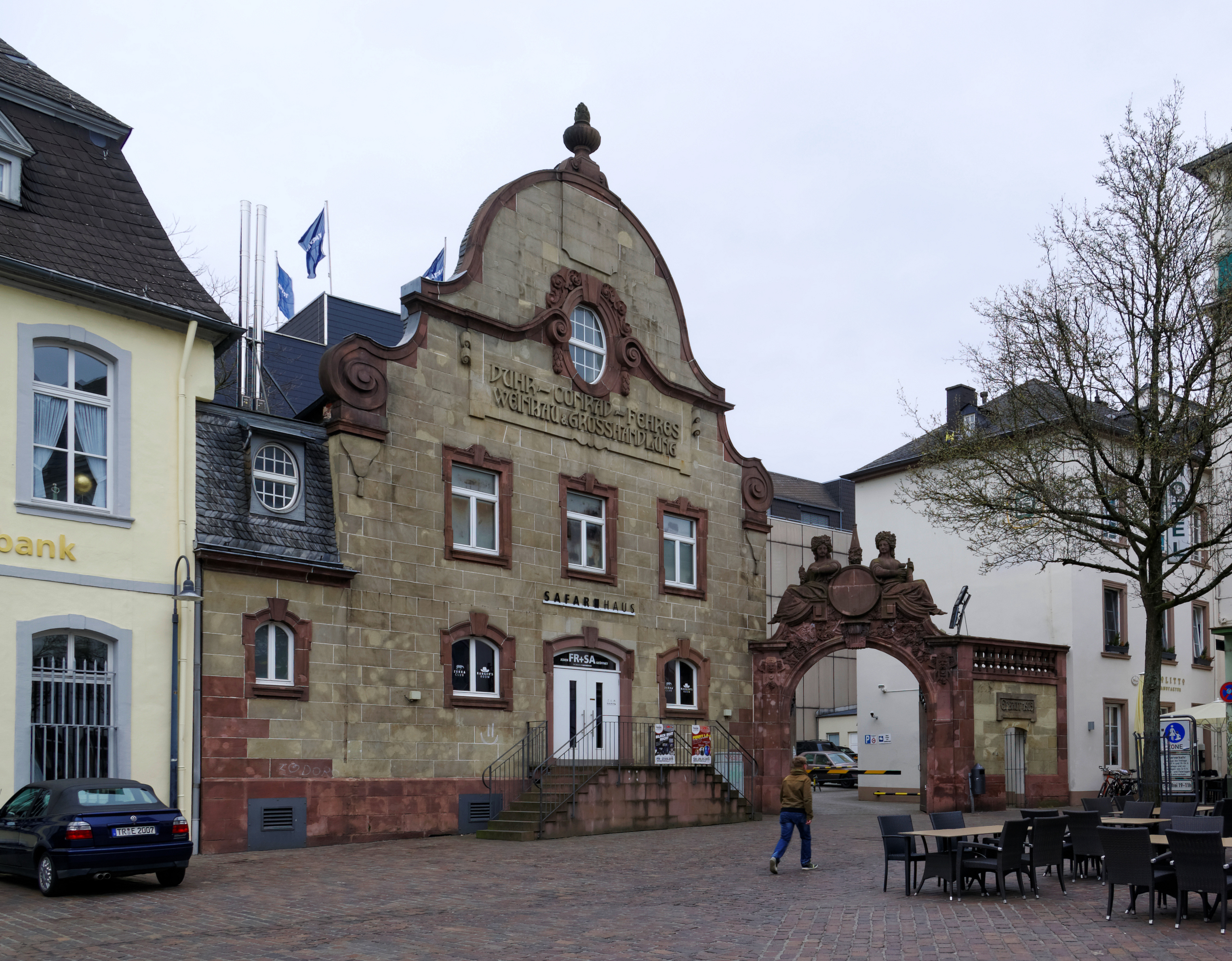 Trier, Stockplatz 2 a repräsentative Sandsteinquaderfassade des späthistoristischen Kellereigebäudes, aufwändige Jugendstil-Toreinfahrt und Hofabschlussmauer, 1904/05, Arch. Carl Reitz; platzbildprägend